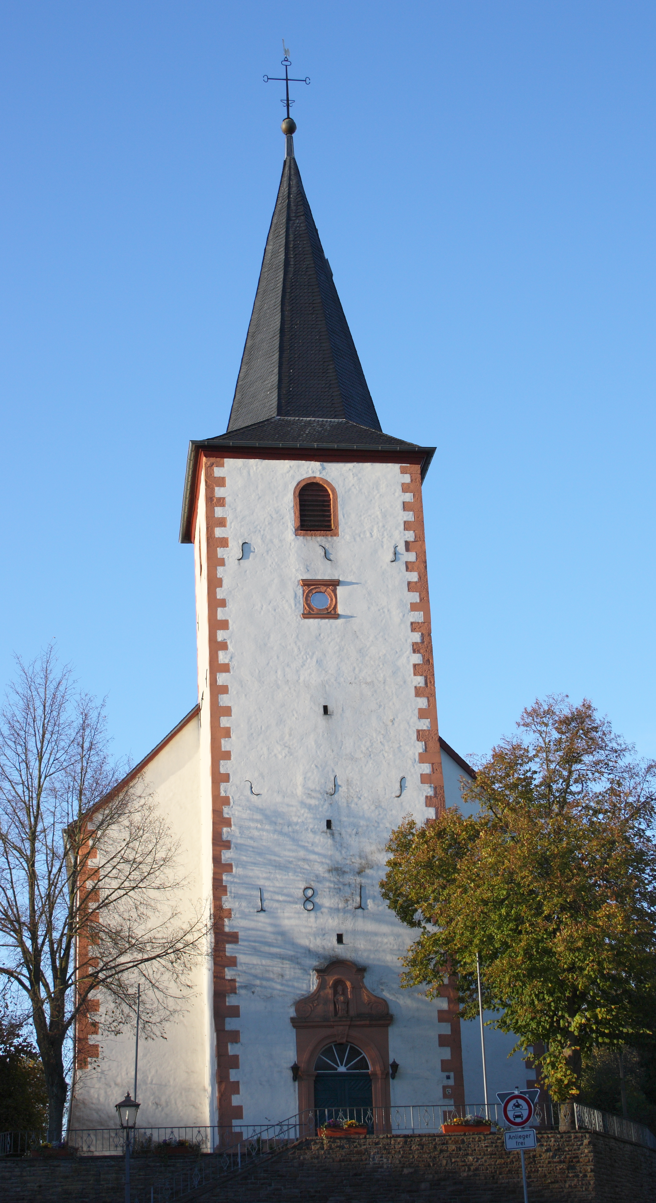 katholische Pfarrkirche St. Lambertus in Tondorf